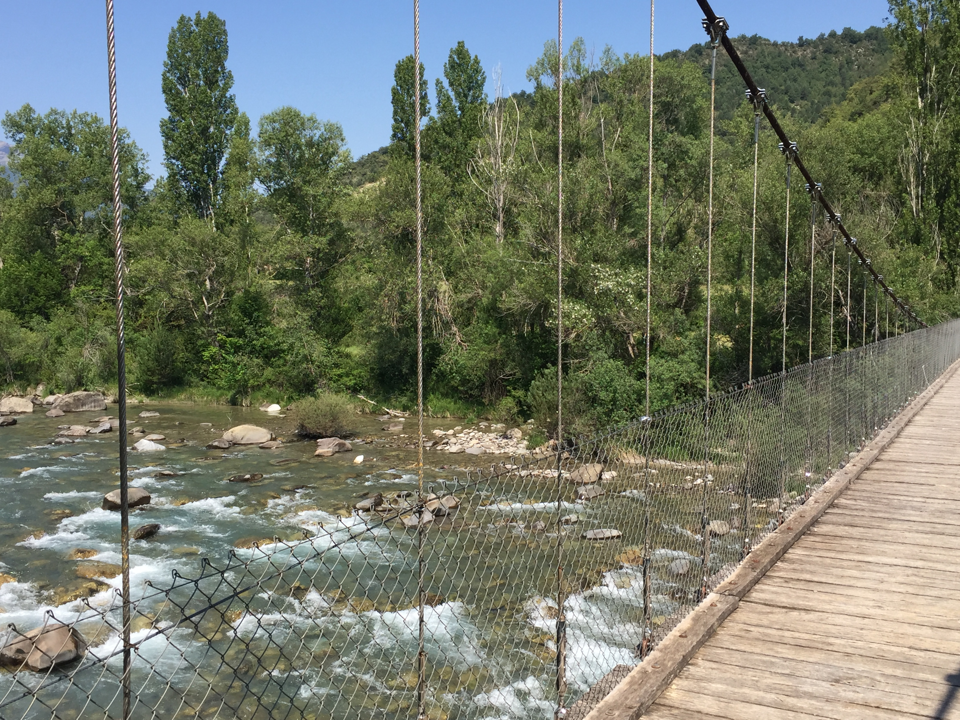 Rio Ara a su paso por la Pasarela de Lacort Fiscal (Huesca)